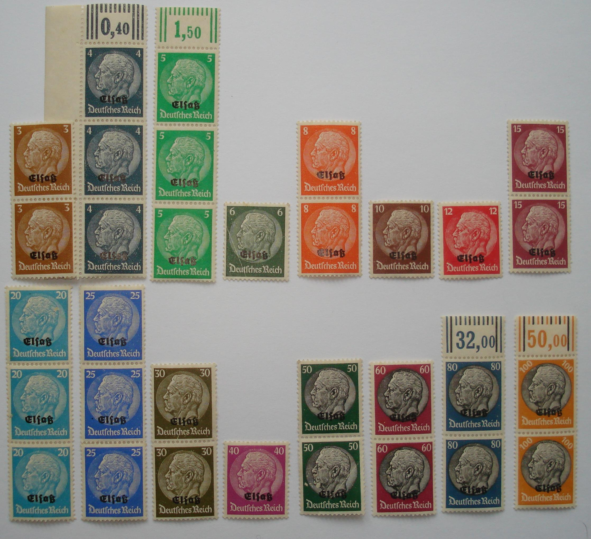 Ensemble des Timbres à l'effigie de Hindenburg surchargés de la mention Elsass utilisés durant l'annexion au IIIe Reich de l'Alsace durant la seconde guerre mondiale